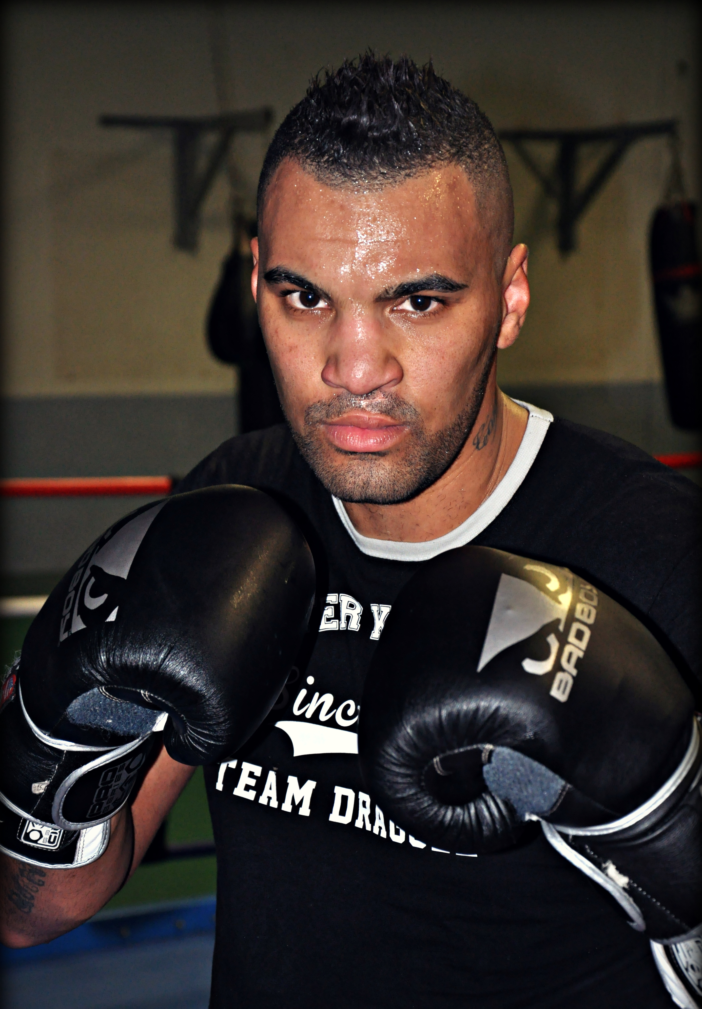 Champion d'Europe WKN +91kg - 2013 Club MASTERKICK Cap d'Agde